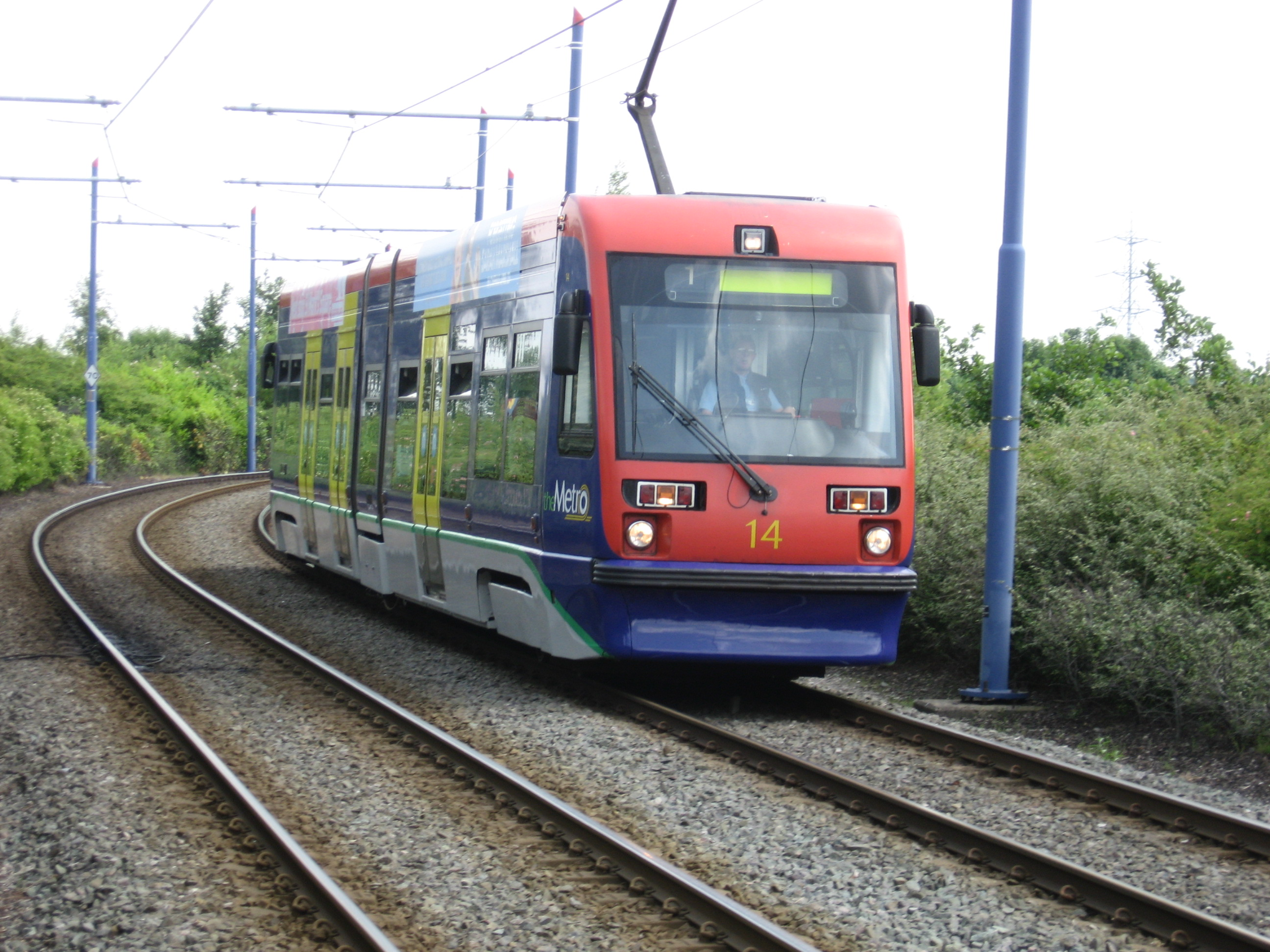 Trams van de Midland Metro in 2008